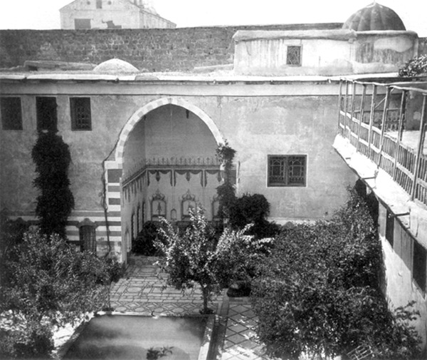 منزل سعيد القوتلي في حي القصاع بدفورد 1862